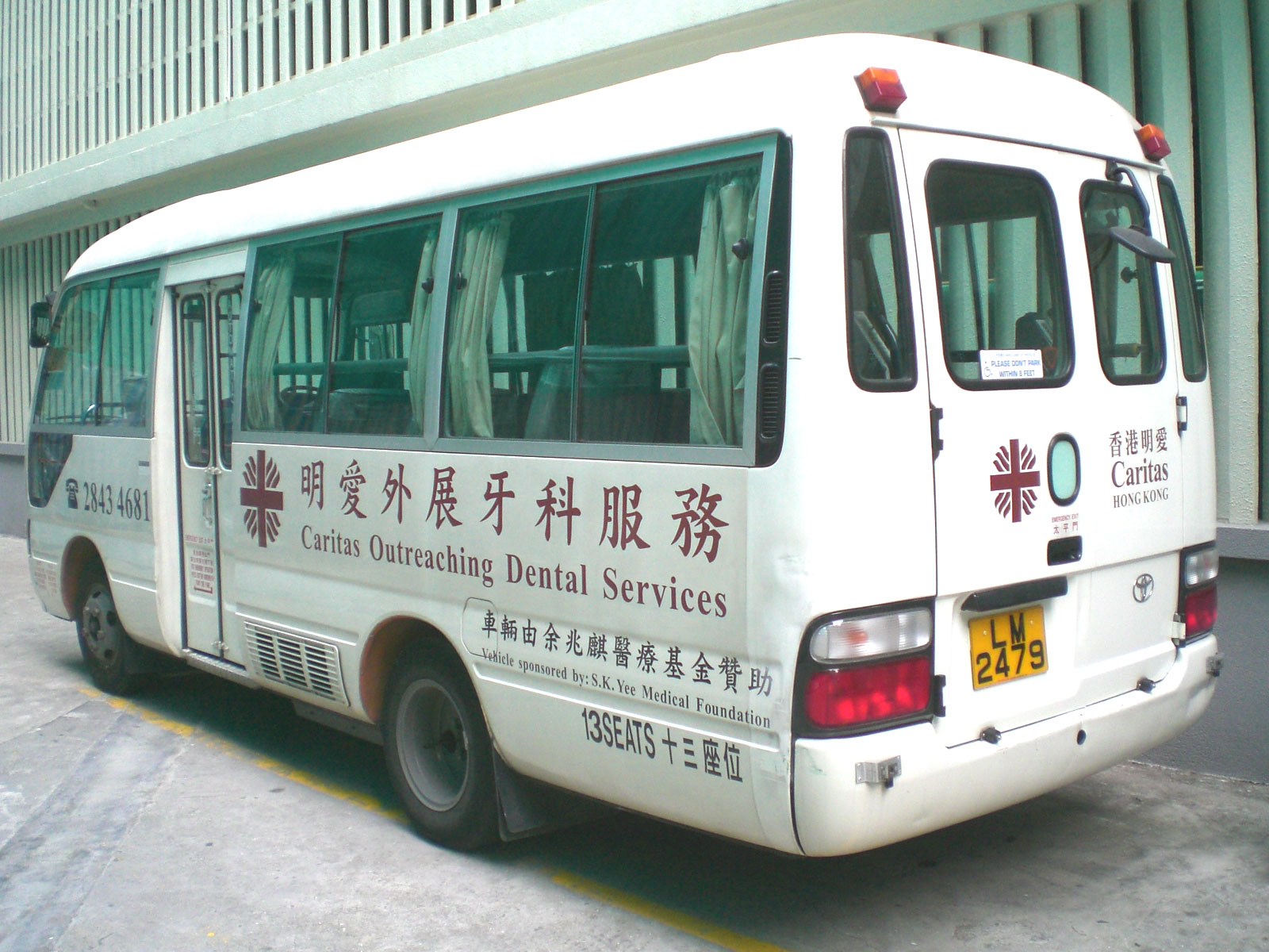 香港明愛 外展牙科服務